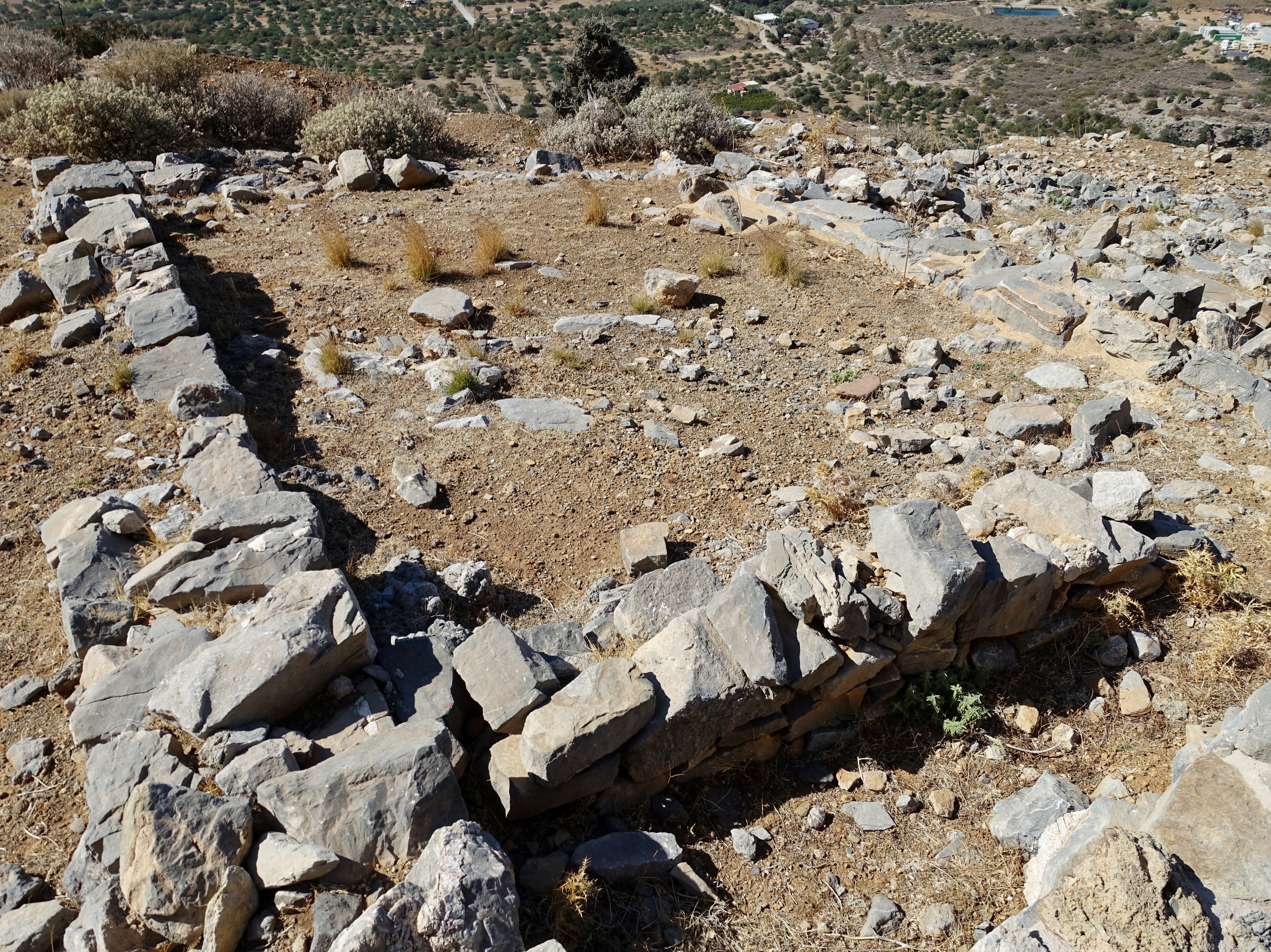 Megaron A1 der Ausgrabungsstätte von Chalasmenos (Χαλασμένος) bei Monastiraki, Kreta, Griechenland